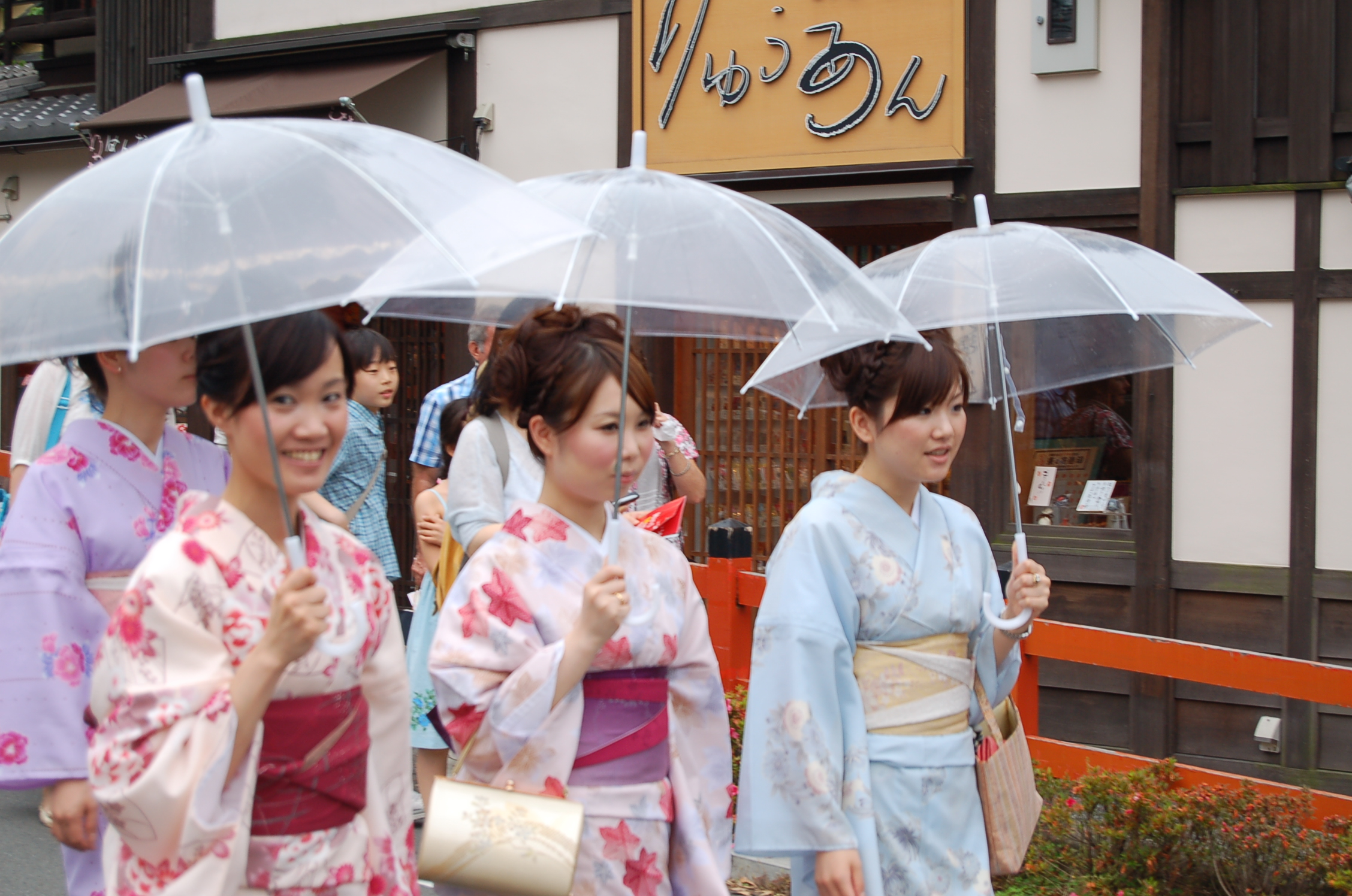 Japan 646